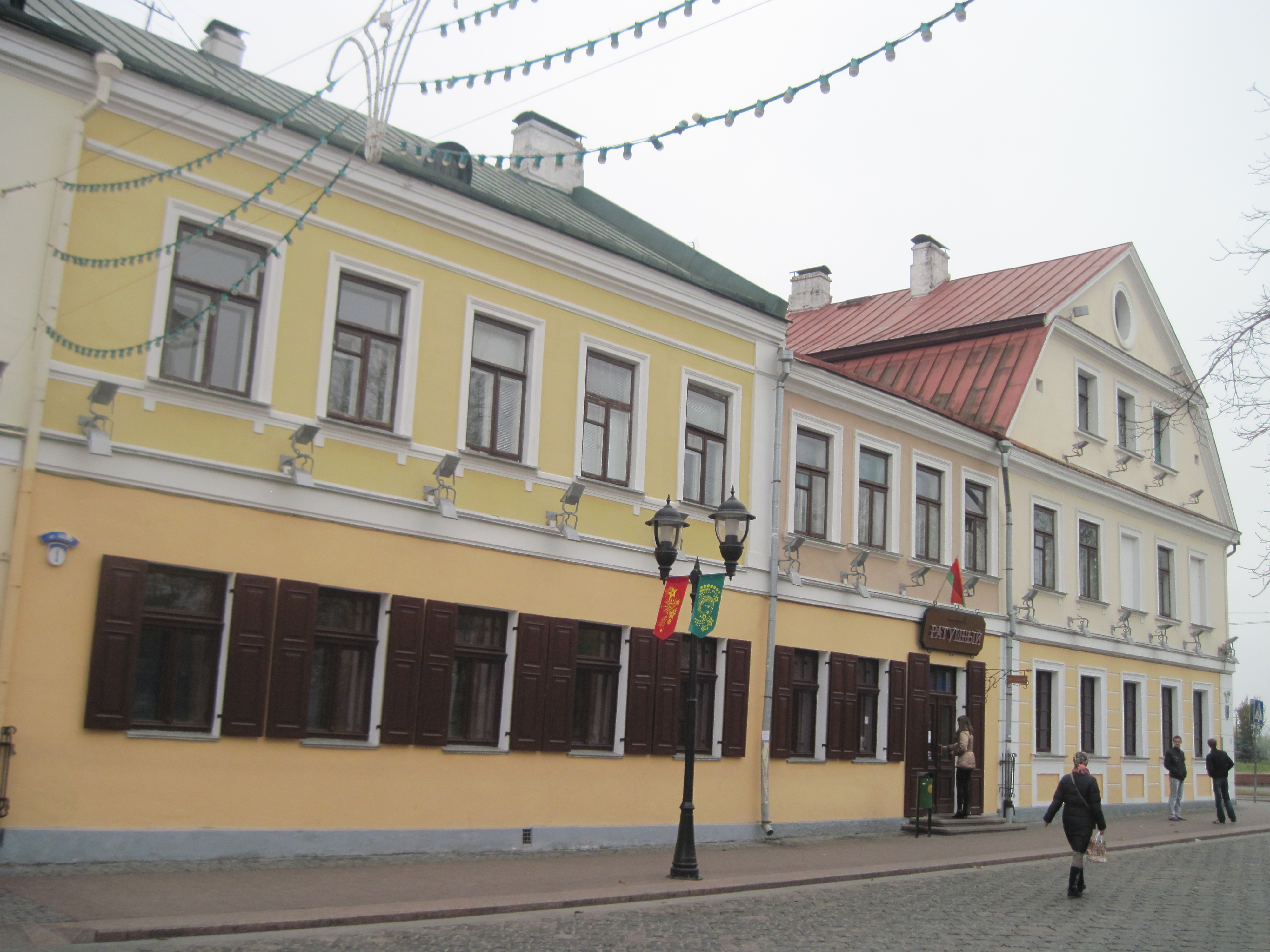 Беларуская (тарашкевіца): Фота будынку па вуліцы Савецкай, 1, у Гродна, Беларусь.